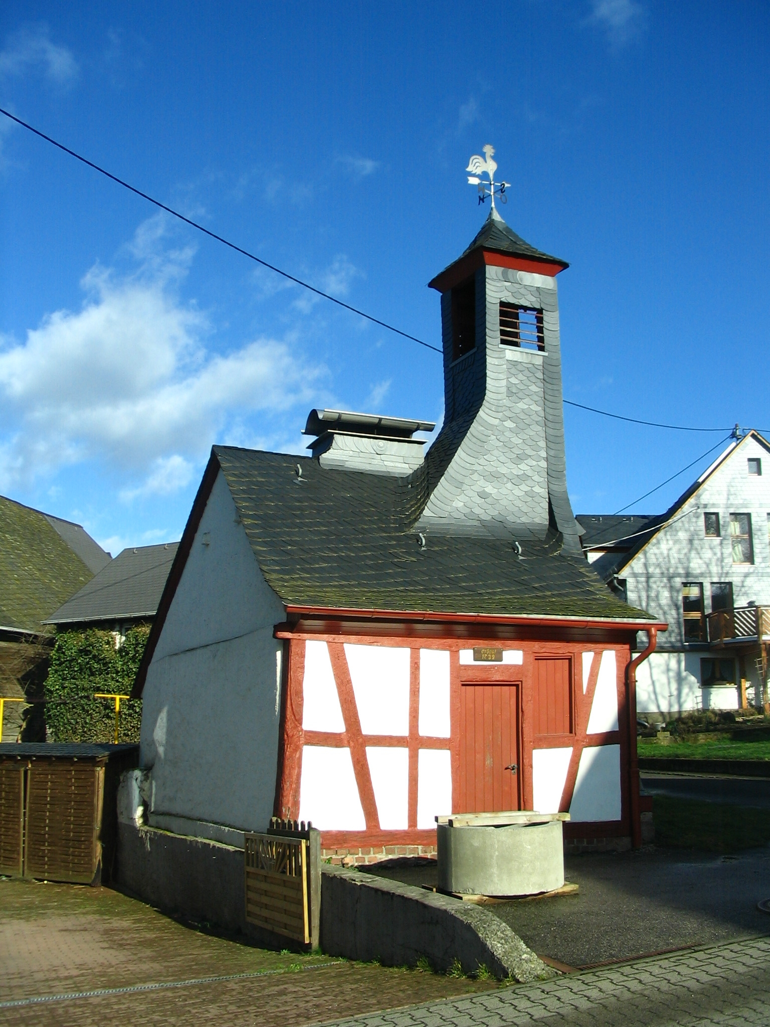 Backhaus mit Glockenturm, 17./18. Jh. This is a photograph of an architectural monument. It is on the list of cultural monuments of Gehlweiler